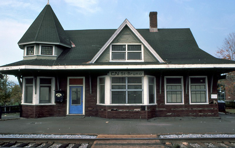 La gare du CN de Saint-Bruno-de-Montarville avait été construite en 1902 à l'intersection du Chemin de la Rabastalière et du boulevard Sir-Wilfrid-Laurier (route 116). Elle fut démolie en 1990.